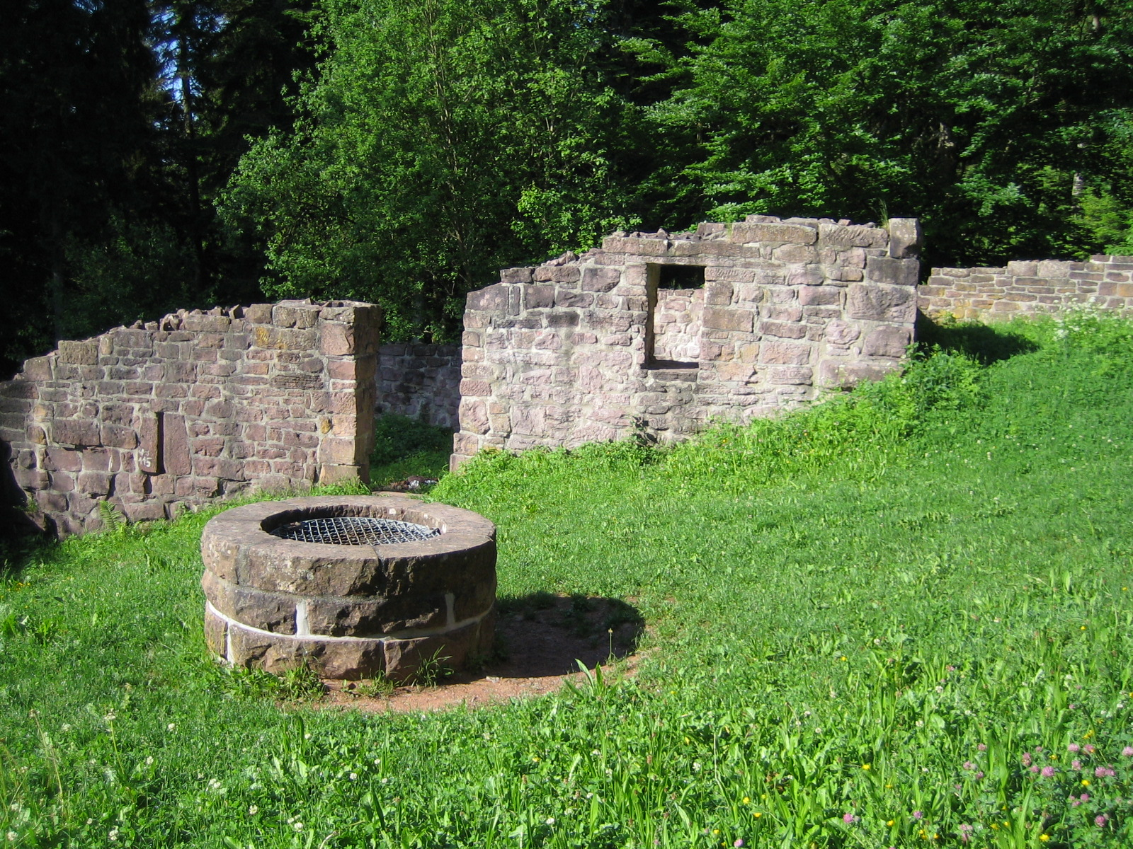 Zisterne (14. Jahrhundert) Neuer Palas (15. Jahrhundert)